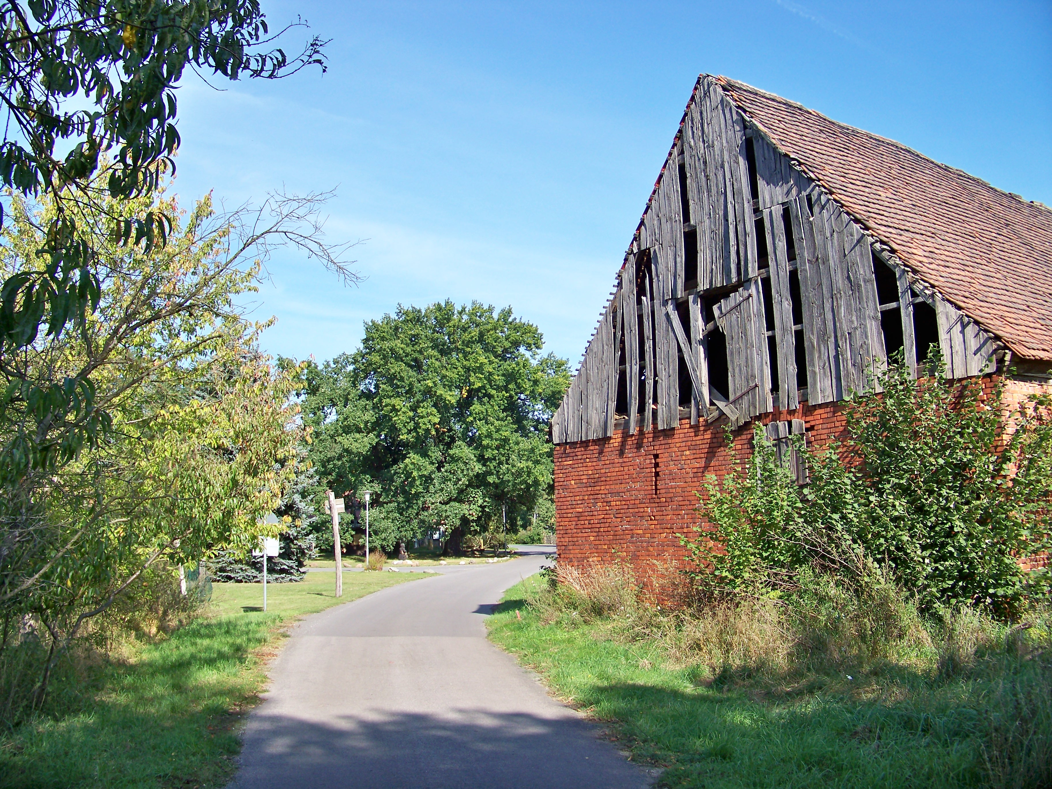 Ortseingang nach Torfhaus/Gemeinde Mockrehna/Sachsen